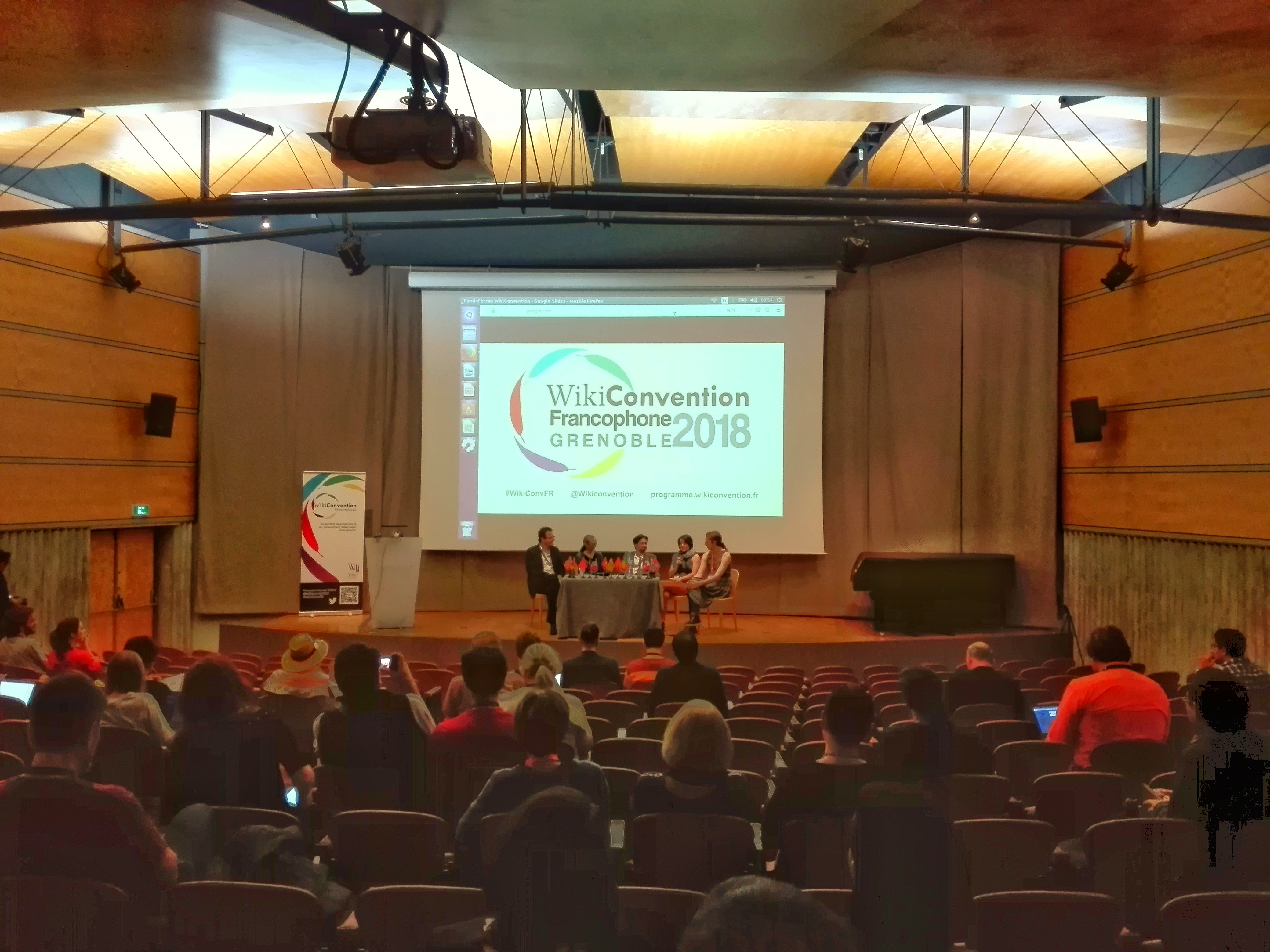 WikiConvention francophone, Grenoble 2018